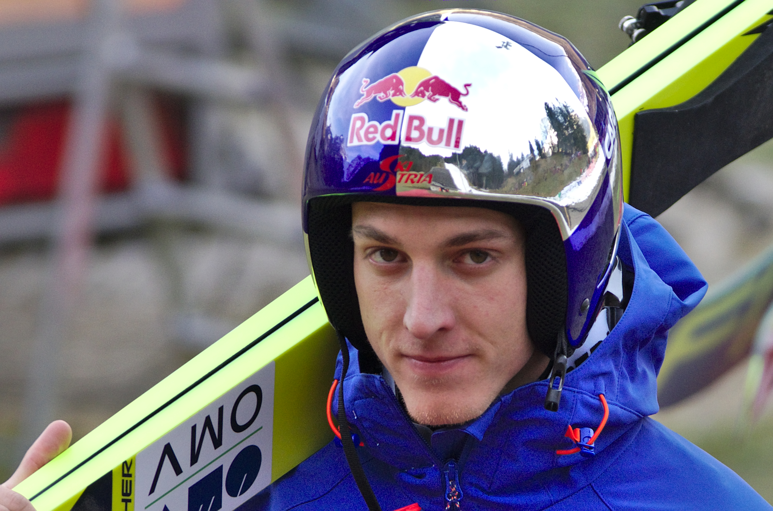 FIS Ski Jumping World Cup 2014 - Engelberg - 20141221 - Gregor Schlierenzauer